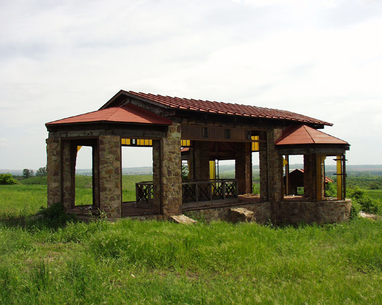 Kővágószőlős, római villa, sírkápolna